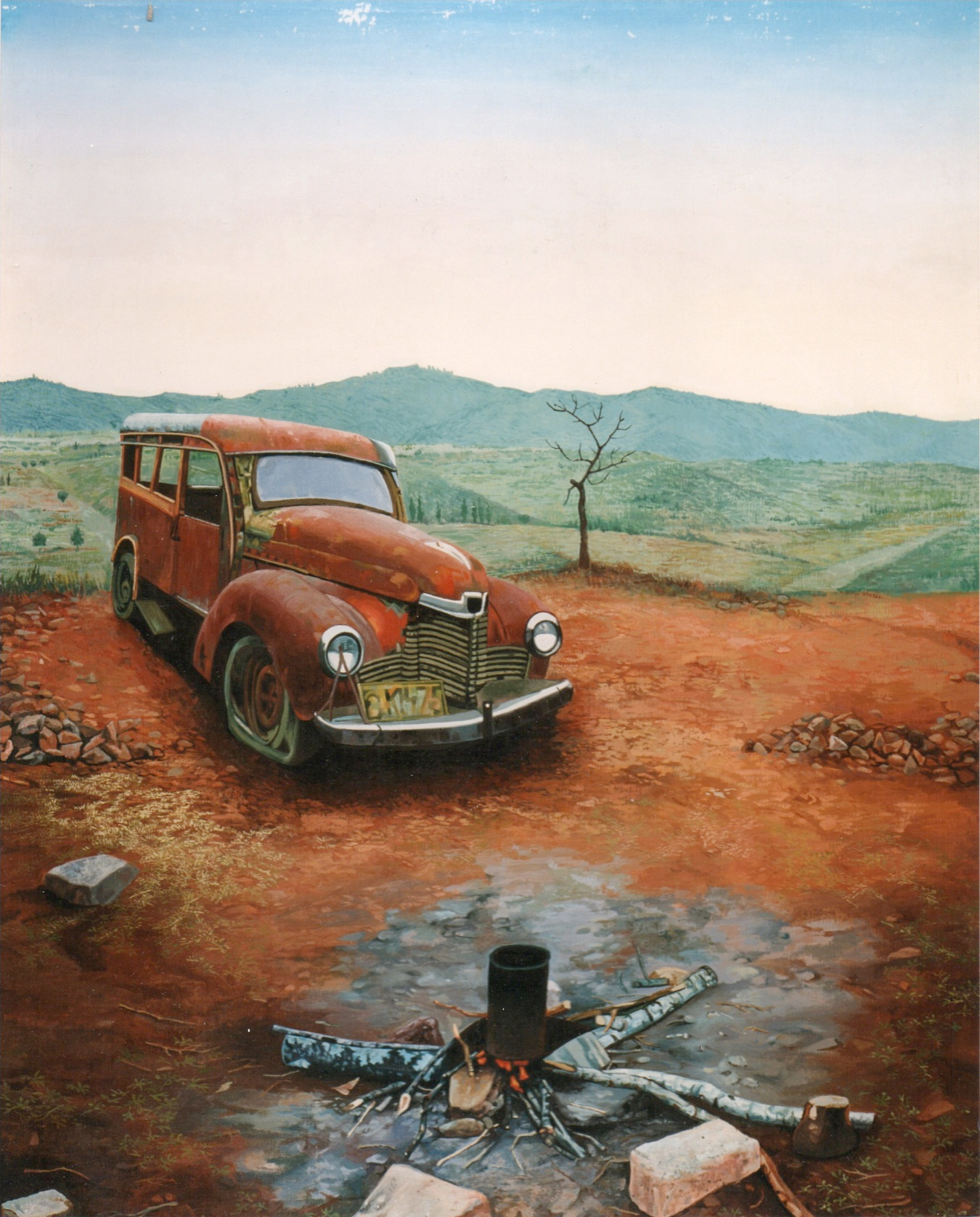 "Dawn" de Enrique Sobisch, 1989